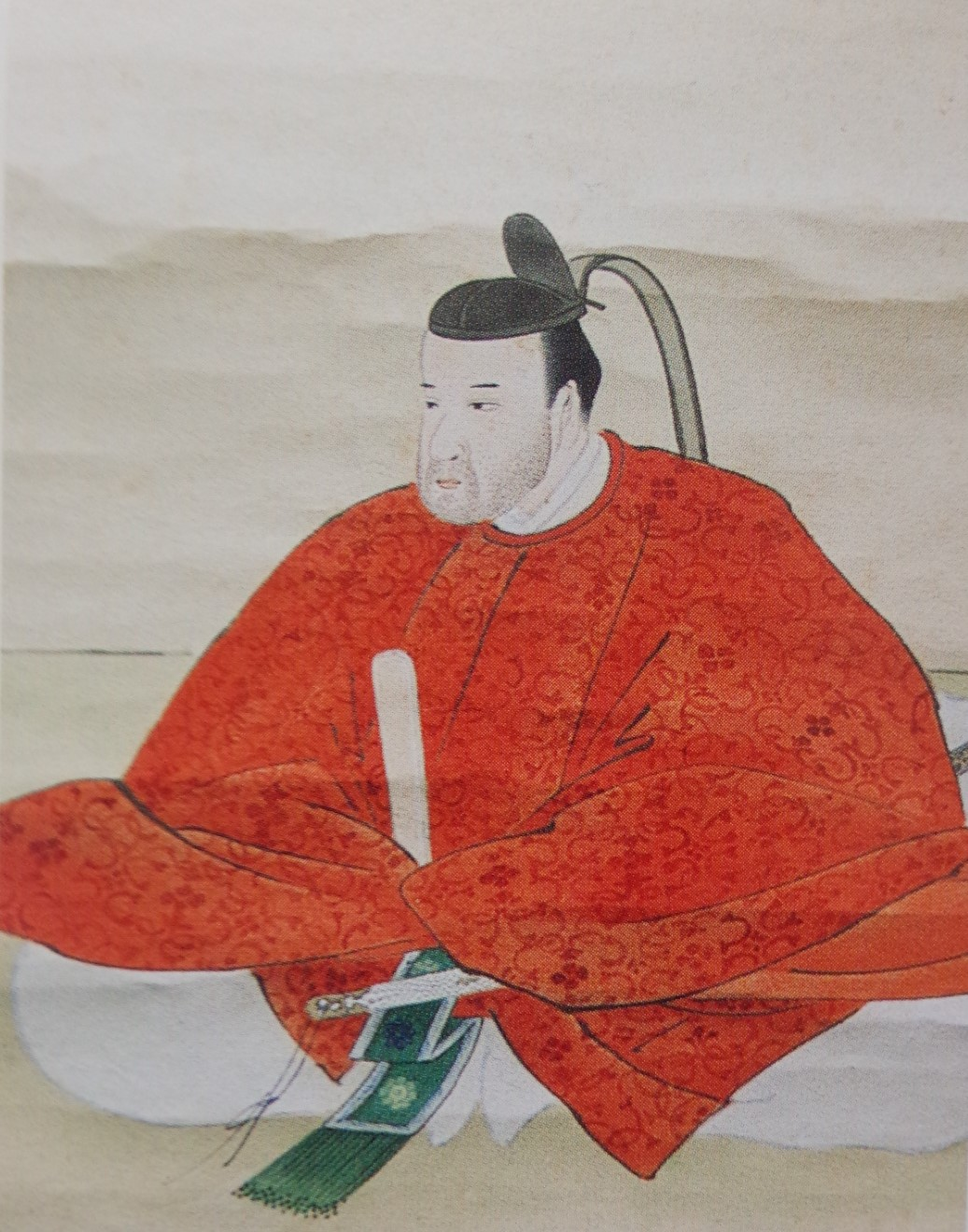 長連弘の肖像。